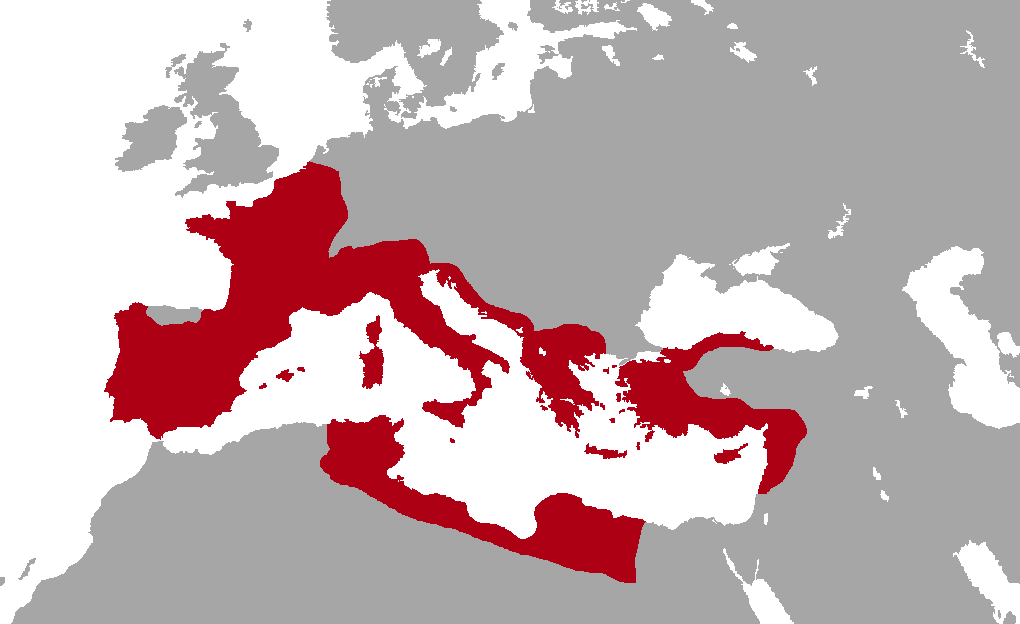 Estensione della repubblica romana nel 44 a.C.